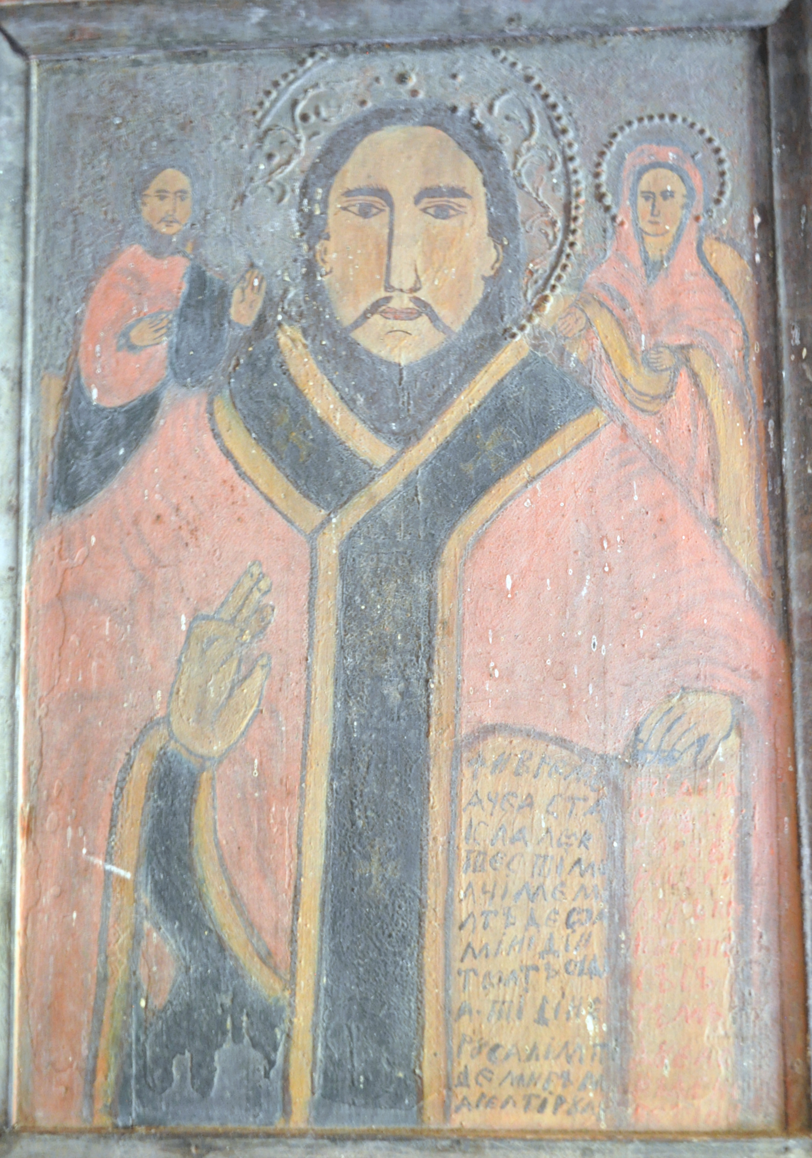 Biserica de lemn din Gârbău Dejului